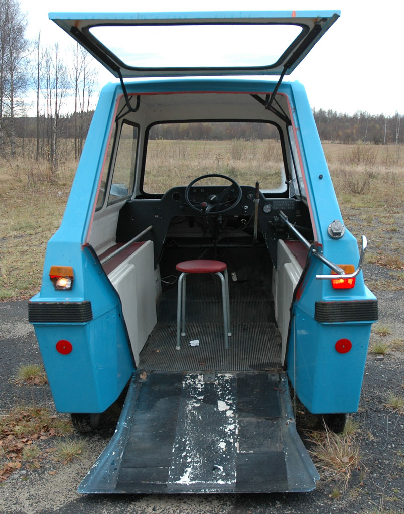 Rolloped bakifrån, öppen lucka